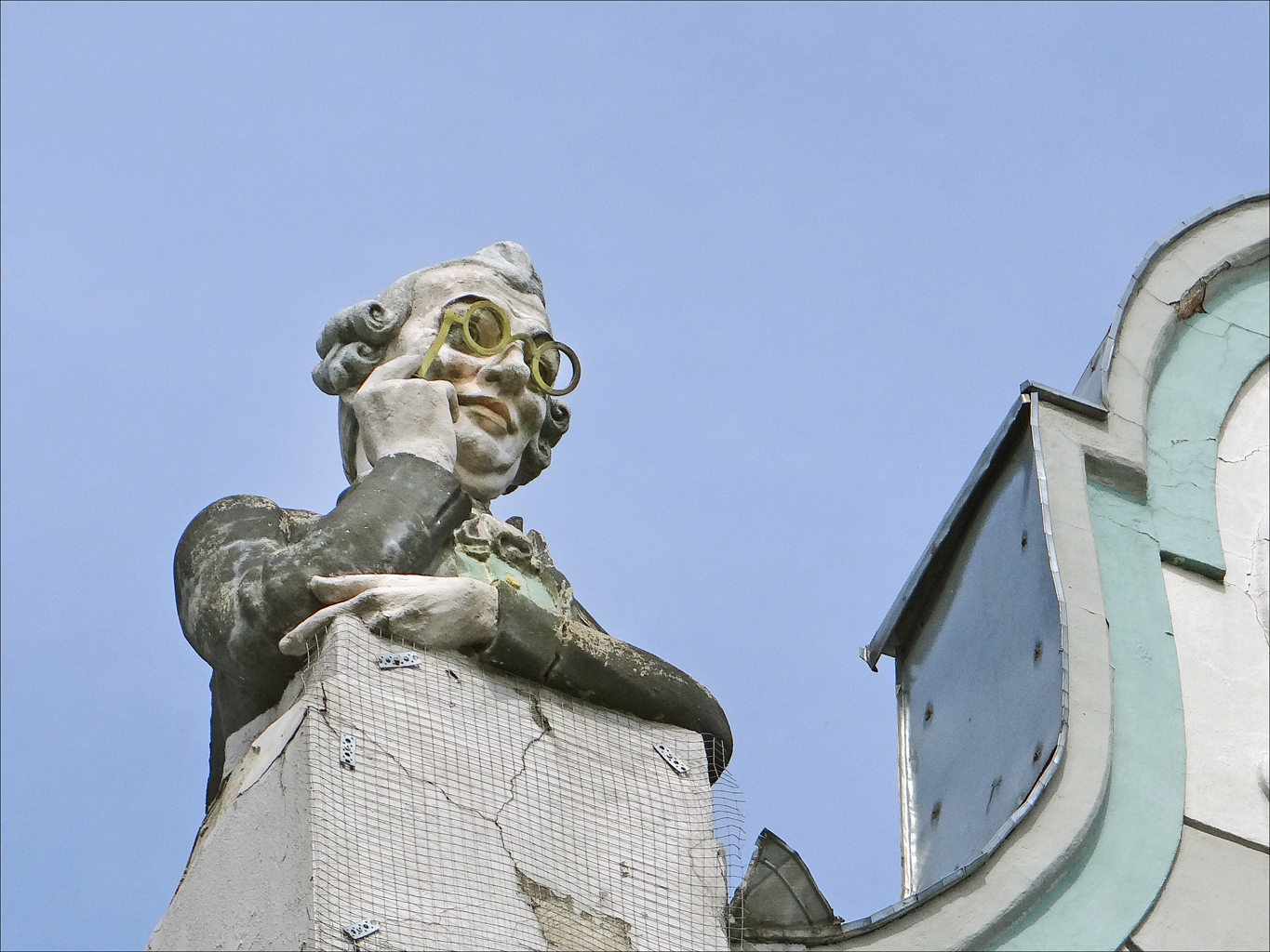 Décor de l'immeuble art nouveau situé au n°23-25 à l'angle des rues Pikk et Hobusepea (Tallinn) L'immeuble a été construit en 1909 par l'architecte Jacques Rosenbaum (1878-1943), originaire de Riga. Les décors polychromes font appel à un bestiaire imaginaire apparaissant dans des mascarons et à des personnages étranges comme cet homme placé sur le toit qui observe l'immeuble d'en face avec ses lorgnons.. Article de Wikipedia sur l'architecte Les sculptures sont d'August Volz